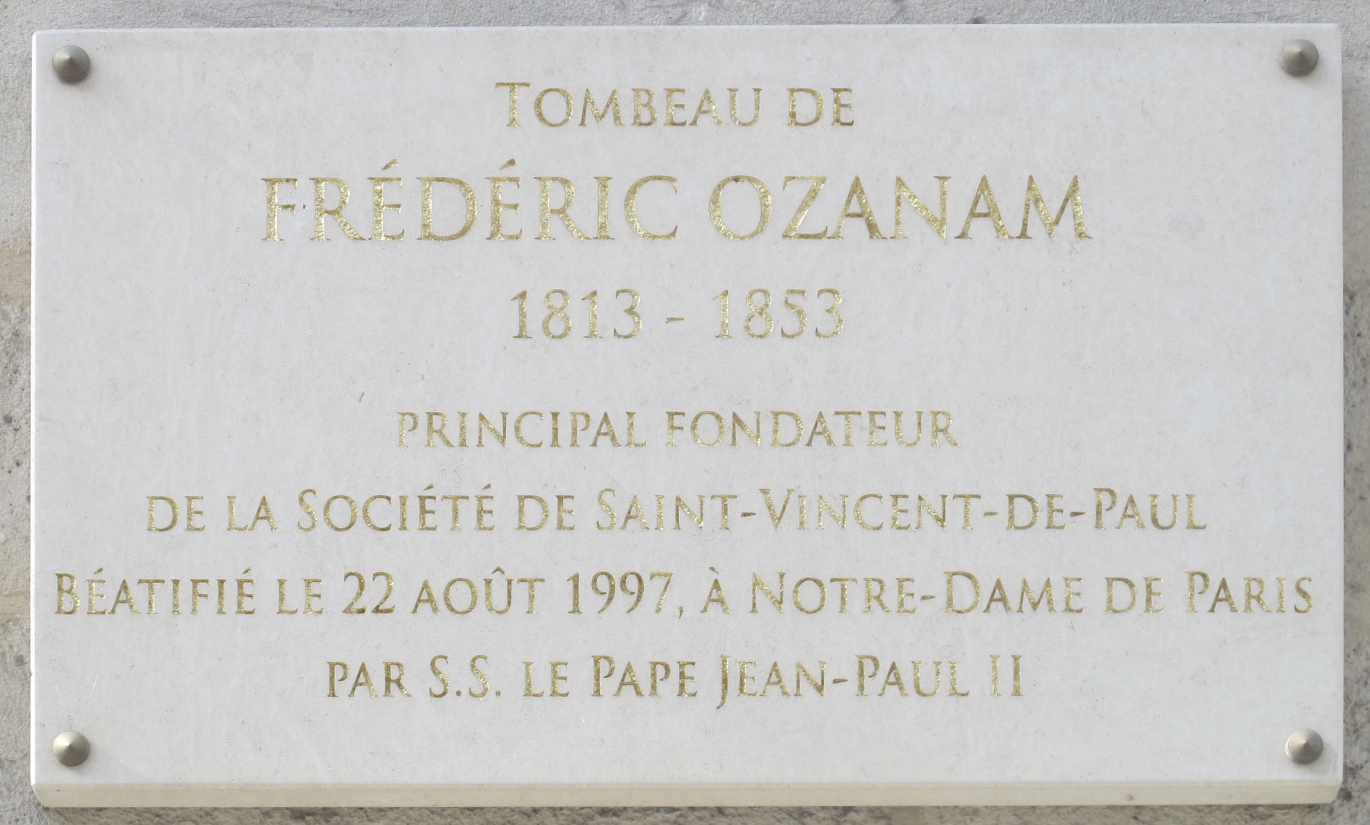 Plaque en hommage à l'historien catholique Frédéric Ozanam, 70 rue de Vaugirard (Paris, 6e).